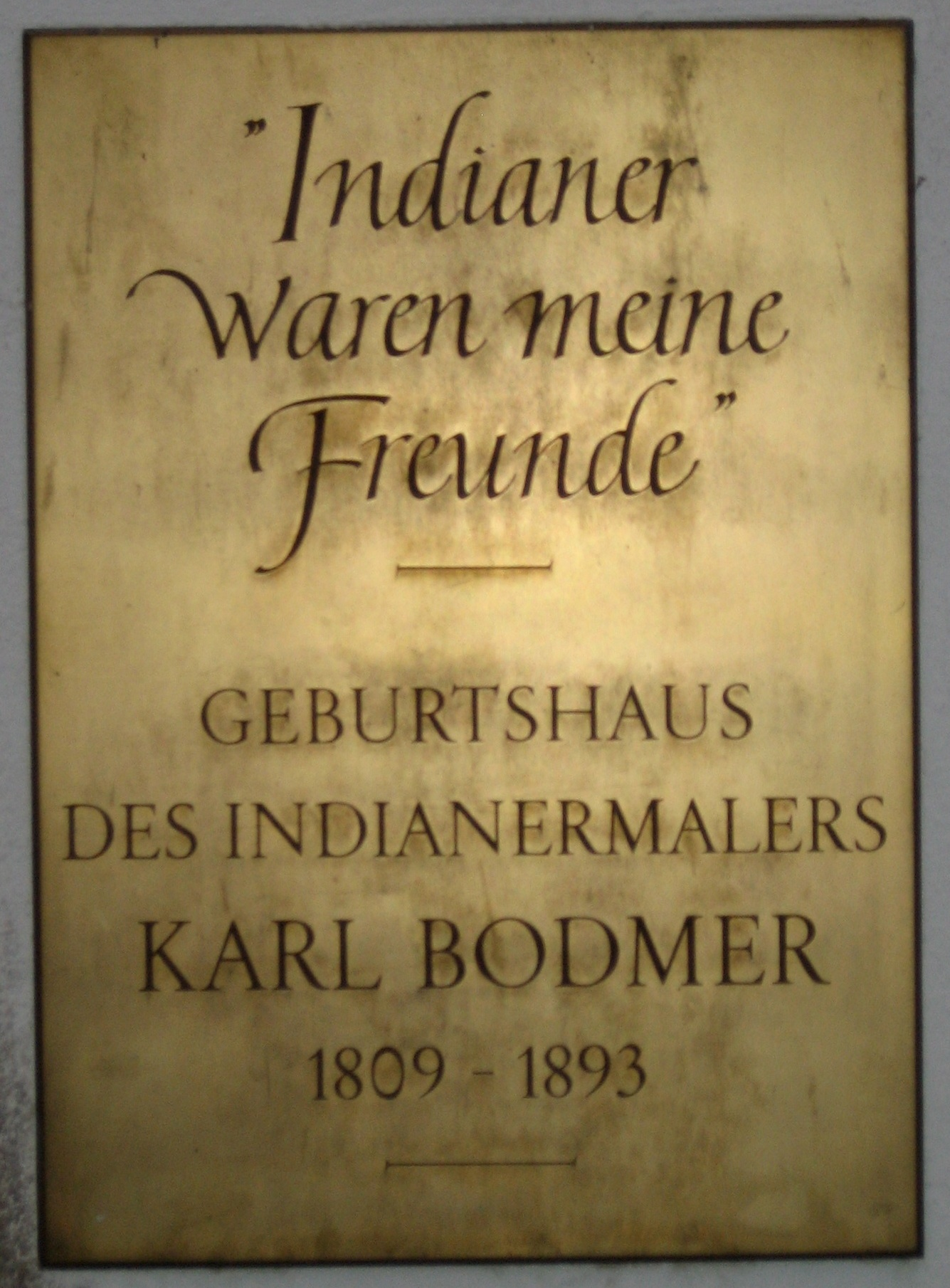 Tafel am Geburtshaus des Malers Karl Bodmer an der Oberdorfstrasse in Zürich